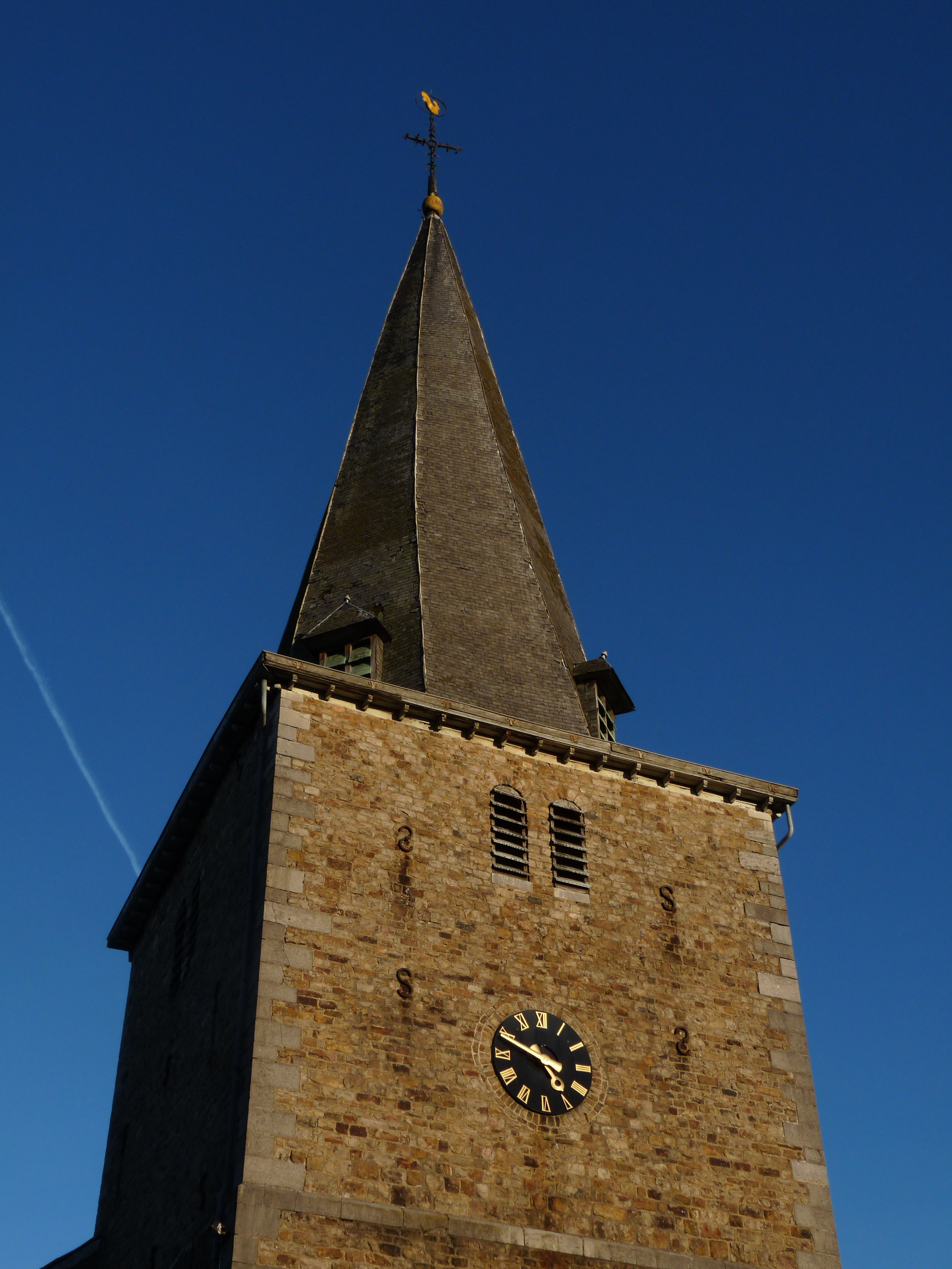 Clocher de l'église de Sart-lez-Spa (Belgique) qui est légèrement tors.